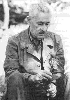 El botánico Manuel Calduch Almela